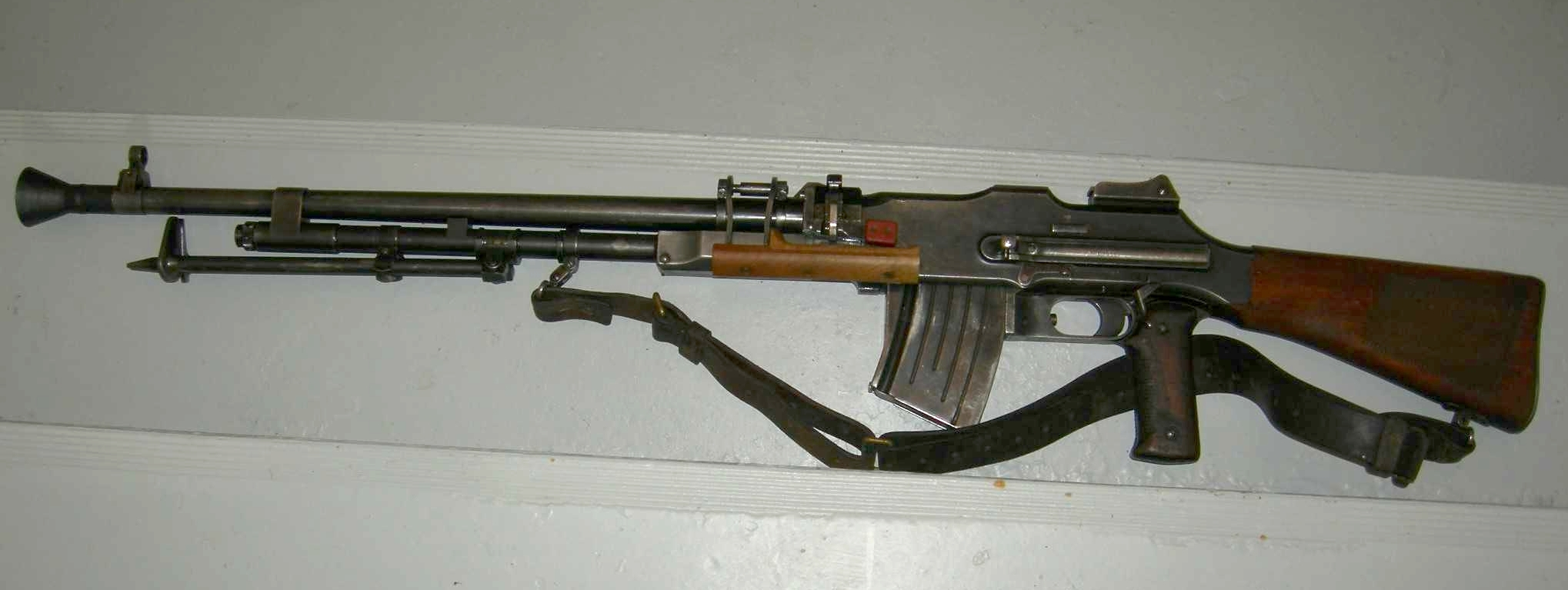 System Colt-Browning med gasuttagsmekanism. Största skottvidd: 4500 m. Mekanisk eldhastighet: 8 sk/sek. Består av: 1 kulsprutegevär, 1 gevärsrem. Delar till slustycke till kulpsrutegevär m/1937.